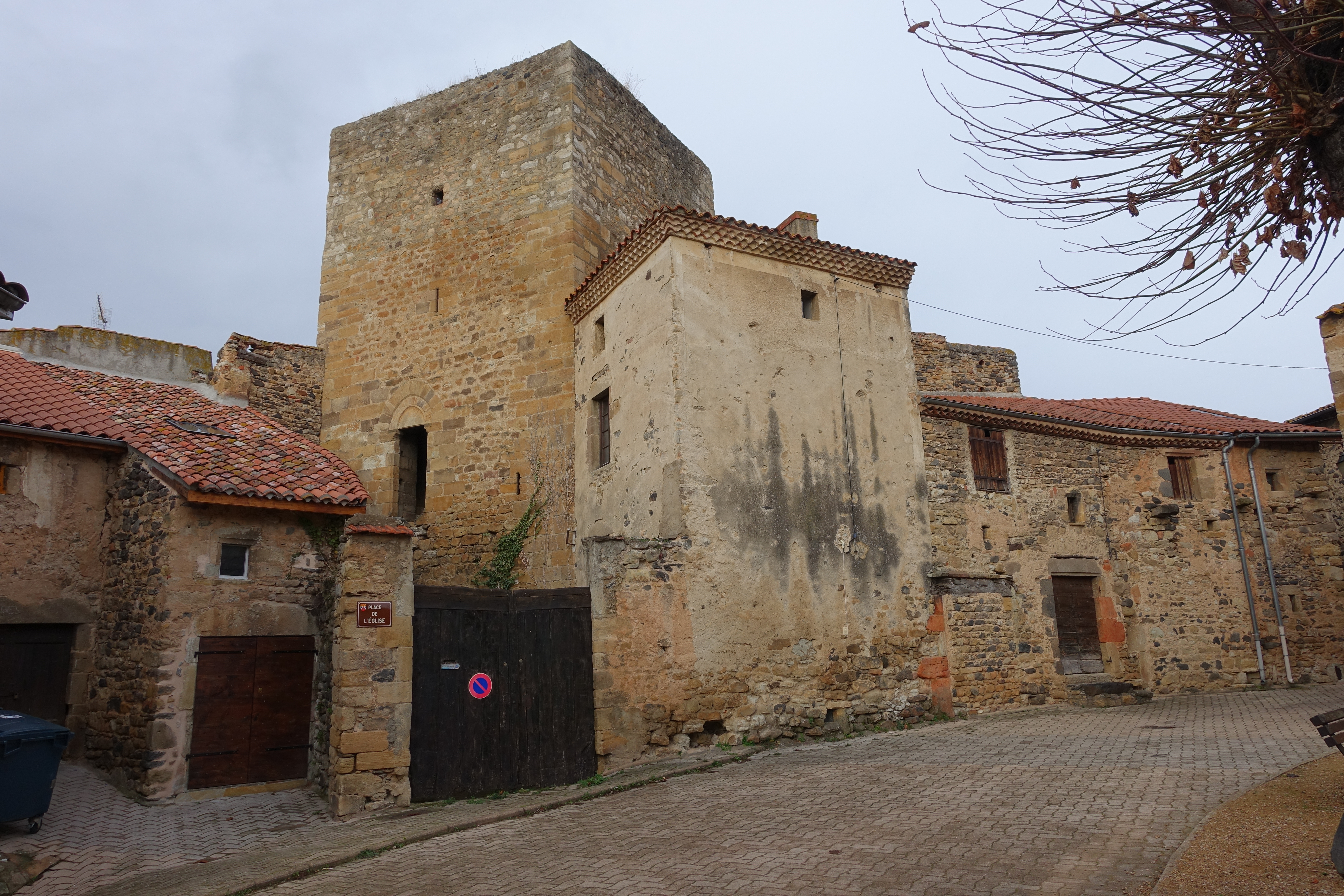 Vestige du Château de Boudes, place de l'église